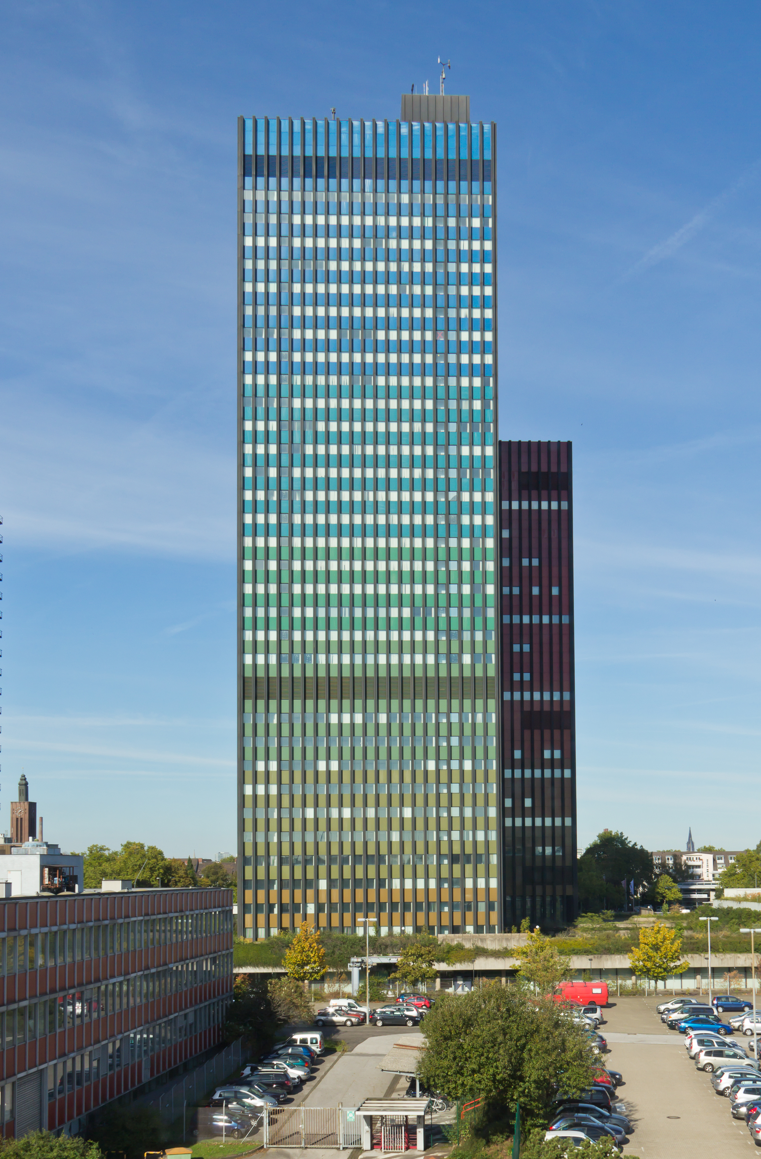 Hochhaus, ehemals Sitz Deutsche Welle, Köln. Architekt: Planungsgruppe Stieldorf, Baujahr: 1976-78, Bauherr: Bundesbaudirektion